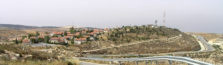 צולם על ידי eman במאי 2006